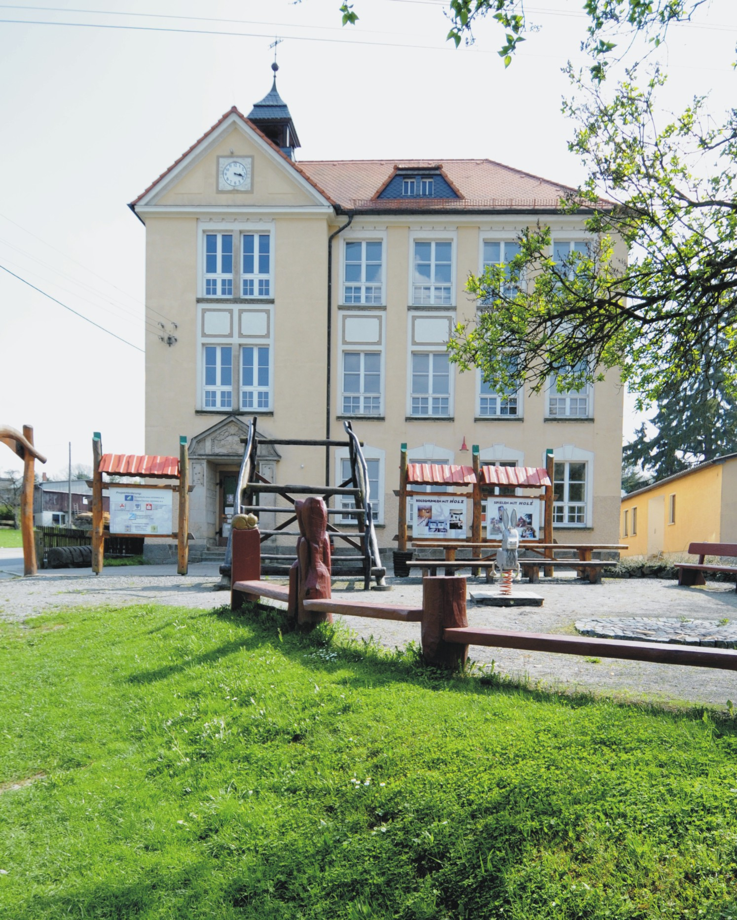 Sohland/Spree, Oberlausitzer Forstmuseum (Sachsen, Deutschland)